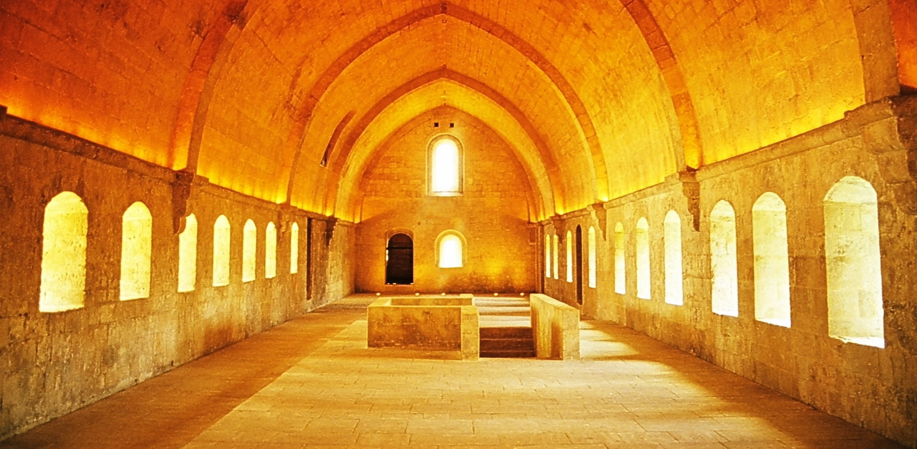 Speisesaal der Abtei Silvacane, Luberon, Frankreich